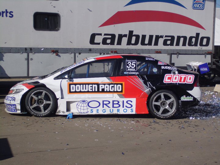 Honda New Civic 2011 de TC 2000. Piloto:Franco Coscia